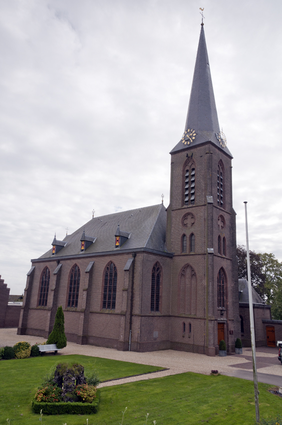 Sint Petrus en Paulus kerk uit 1879.